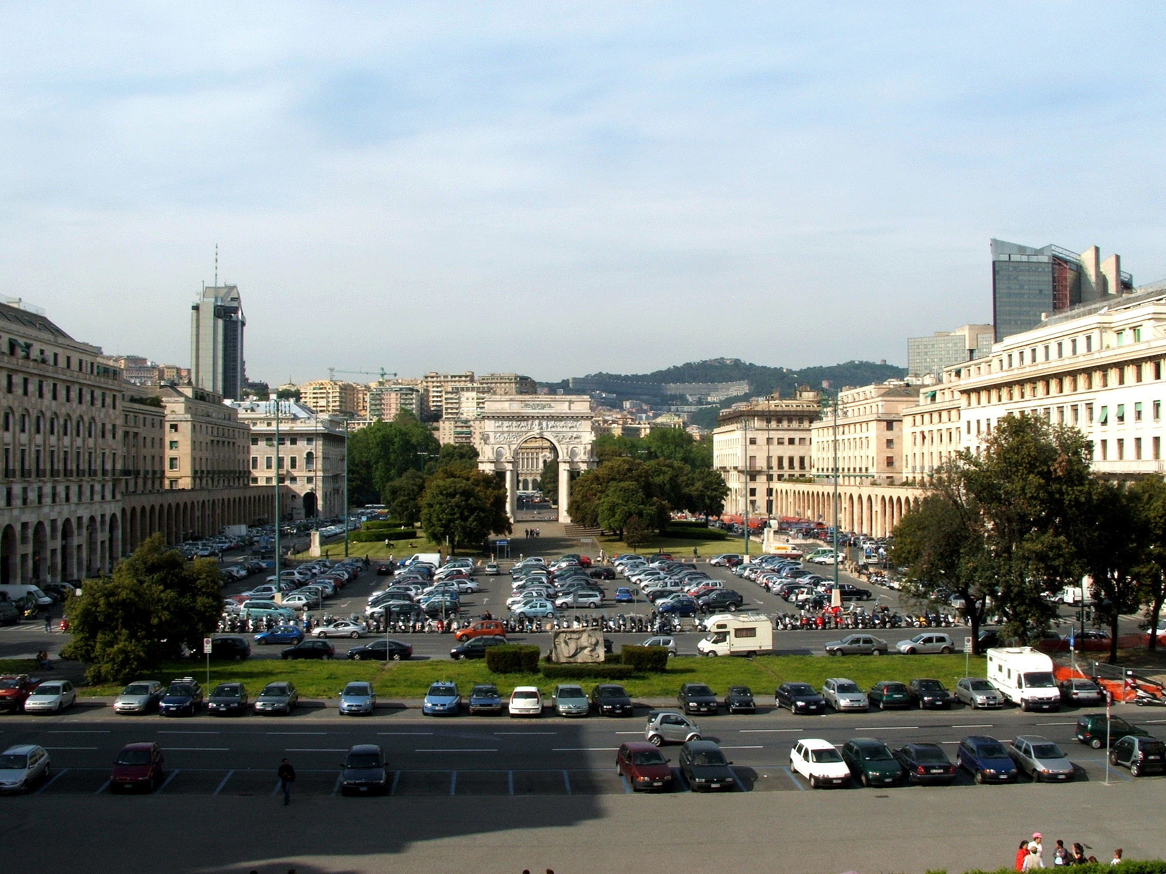 Genova, Piazza della Vittoria dalla Scalinata delle Caravelle